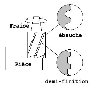 Shéma d'une fraise d'ébauche.